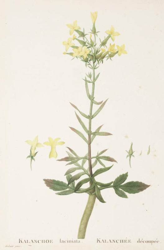 Kalanchoe laciniata - Tafel 100 aus Candolles Plantarum Historia Succulentarum Band 2